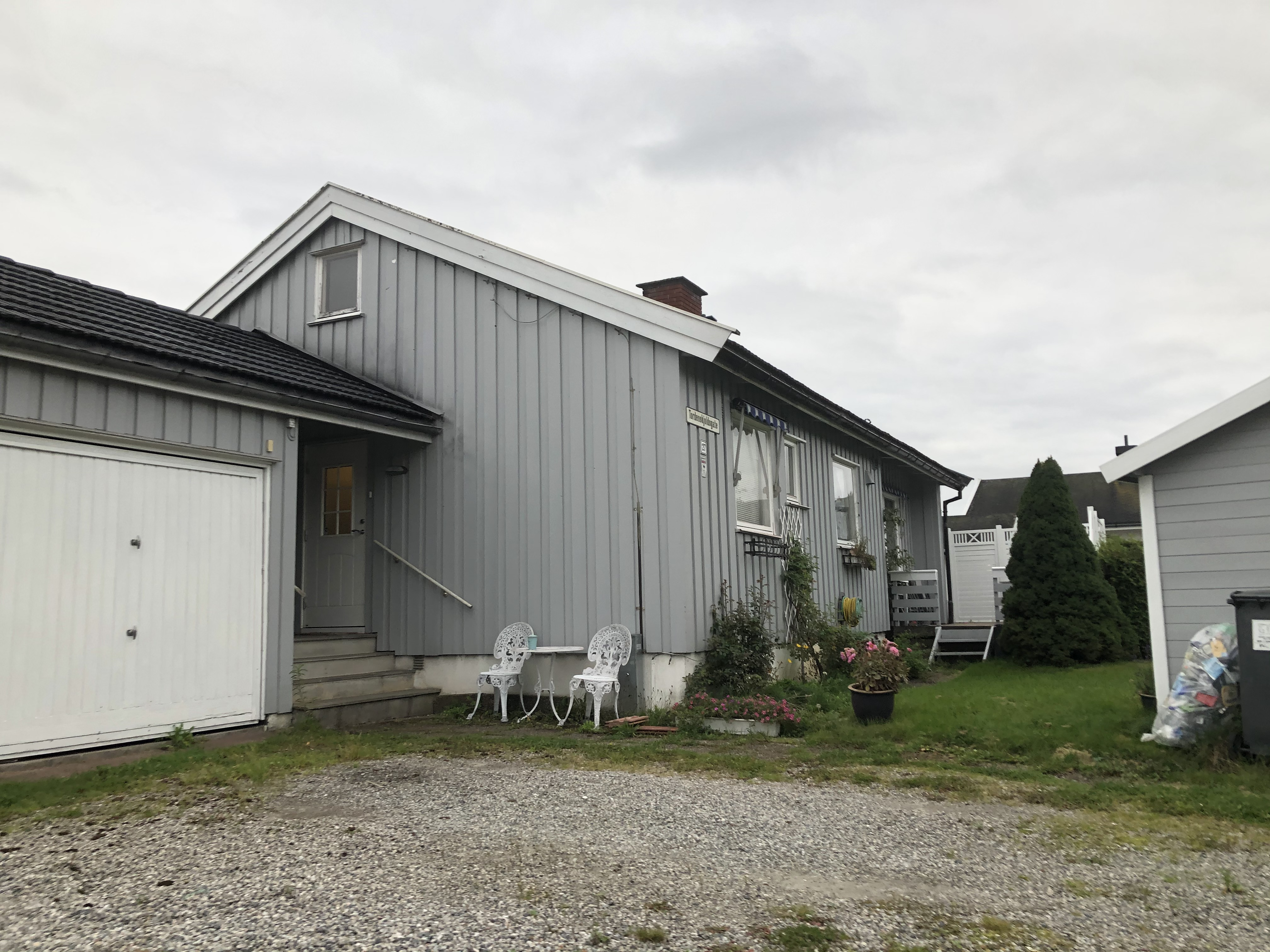 Tordenskiolds gate 27 Sett fra Jernbaneveien